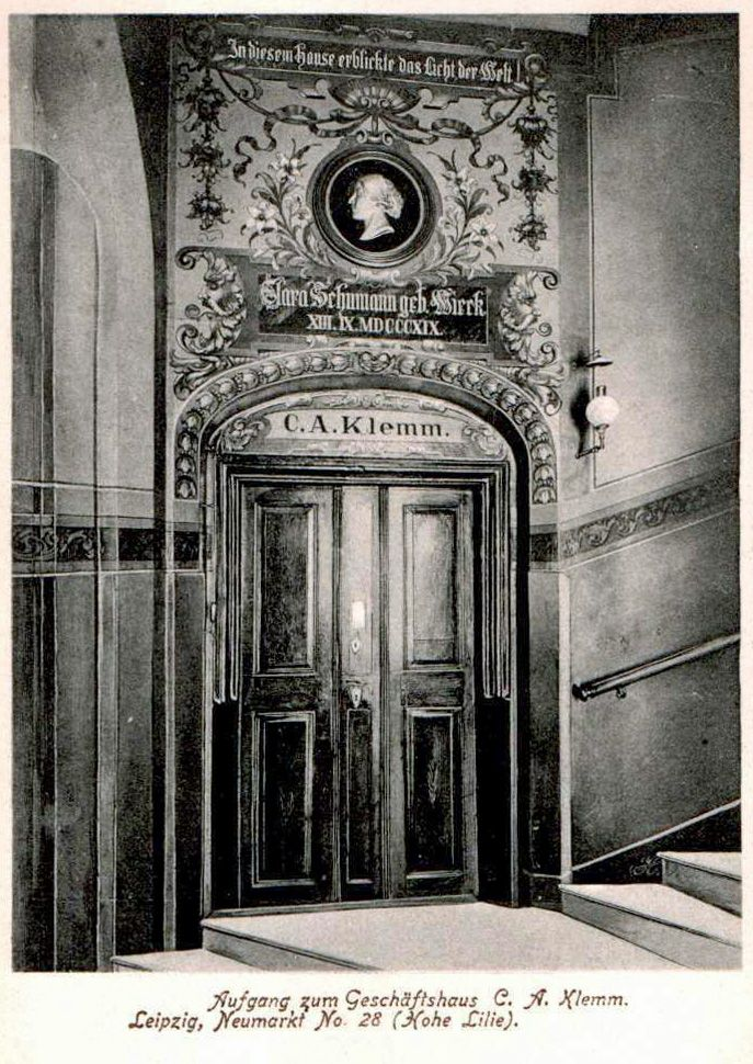 Als Gedenkort gestaltete Tür zur ehemaligen Wohnung Wieck im Haus Hohe Lilie in Leipzig, in der Clara Schumann geboren wurde